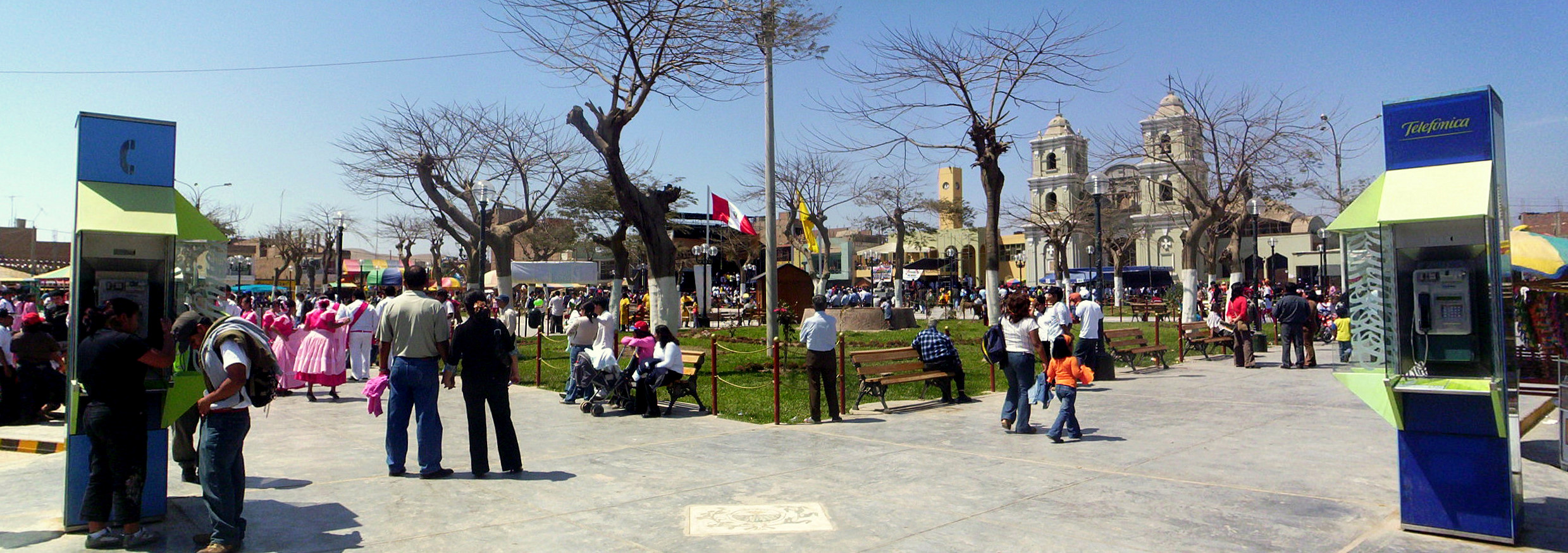 Imperial, Perú. Panorama compuesto por 3 fotos. Imperial, Peru. Panorama stitched from 3 photos.